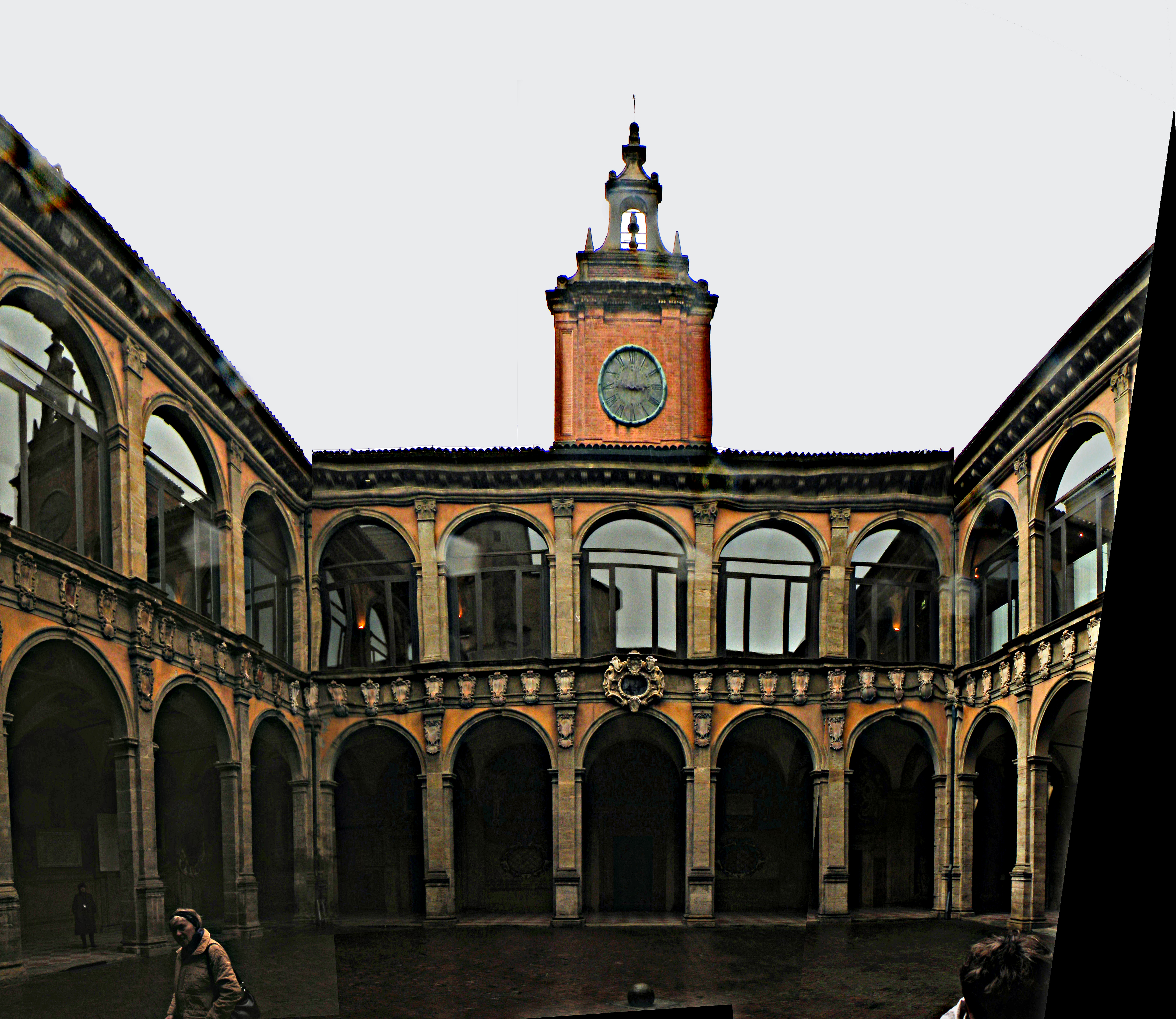 Болонский университет